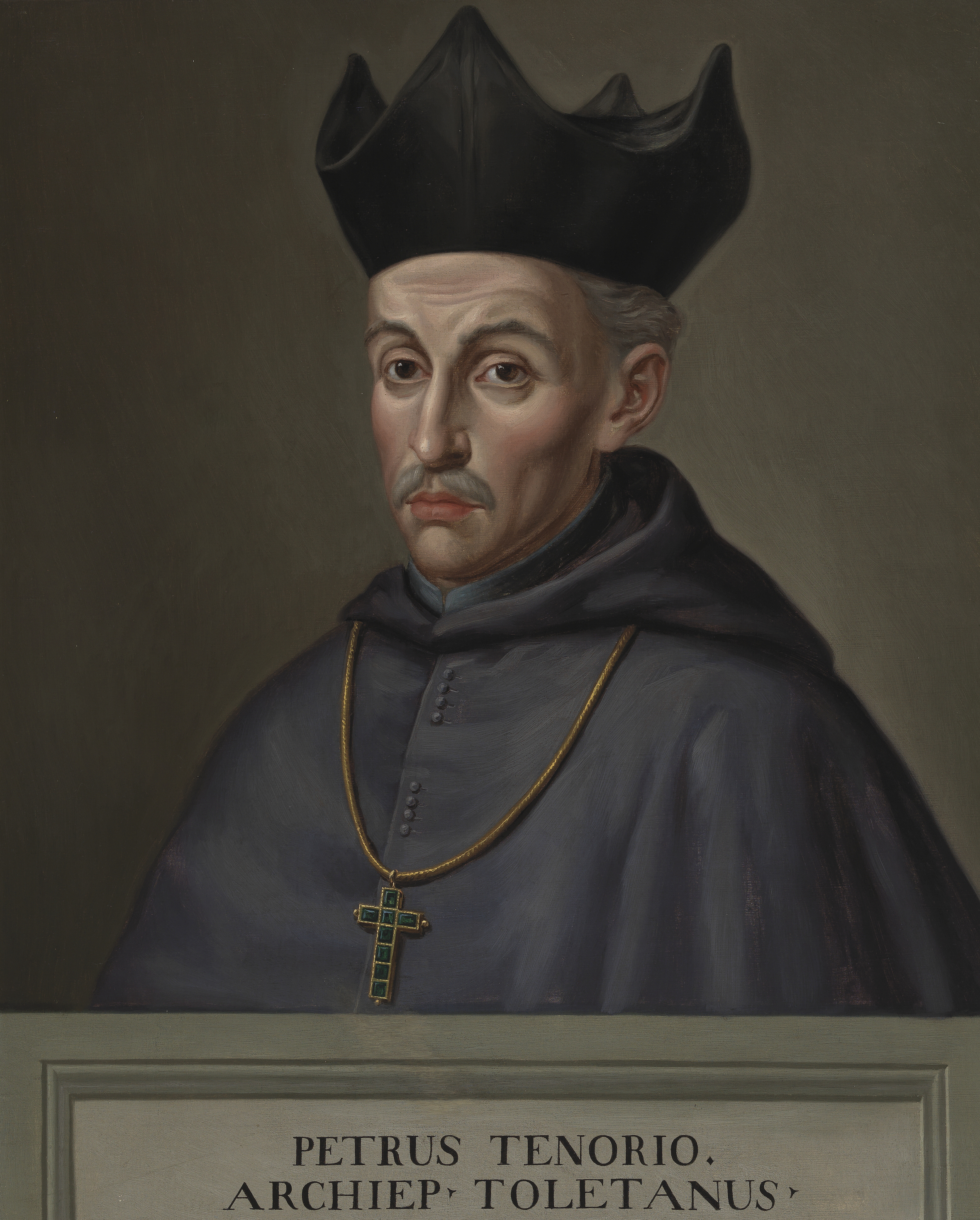 Retrato imaginario del eclesiástico español Pedro Tenorio (m. 1399), que llegó a ser obispo de Coimbra y arzobispo de Toledo. Esta obra es una copia del retrato del arzobispo conservado en el Palacio arzobispal de Toledo.